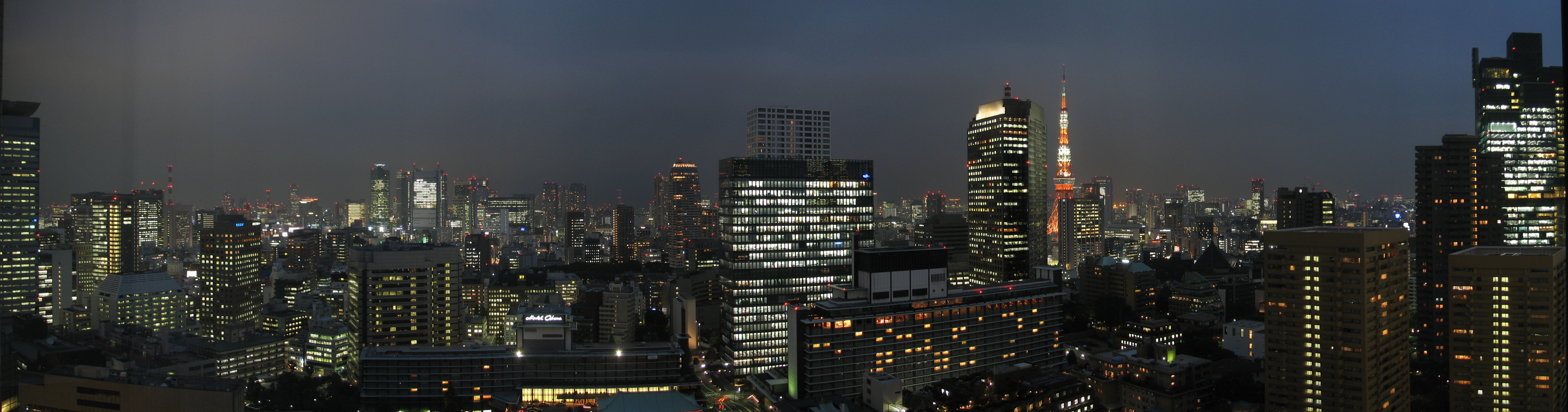 Blick aus dem ANA Hotel (Roppongi, Minato (Tokyo)) über Toyko